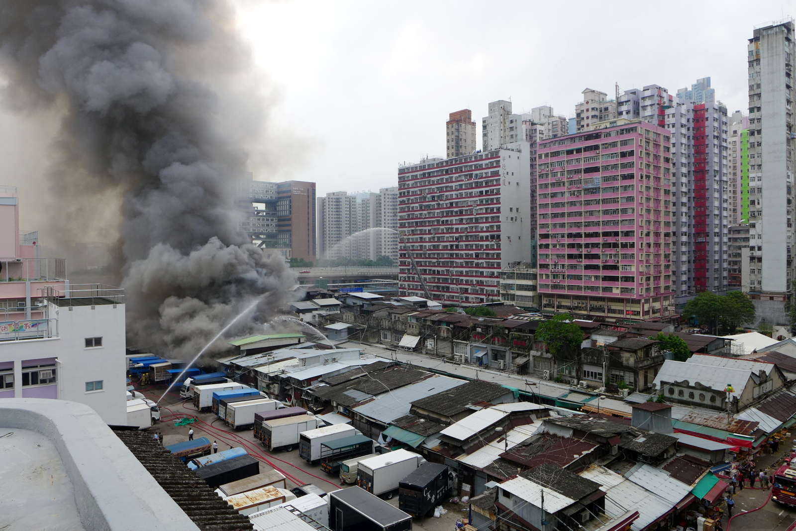 Yau Ma Tei Wholesale Fruit Market Fire